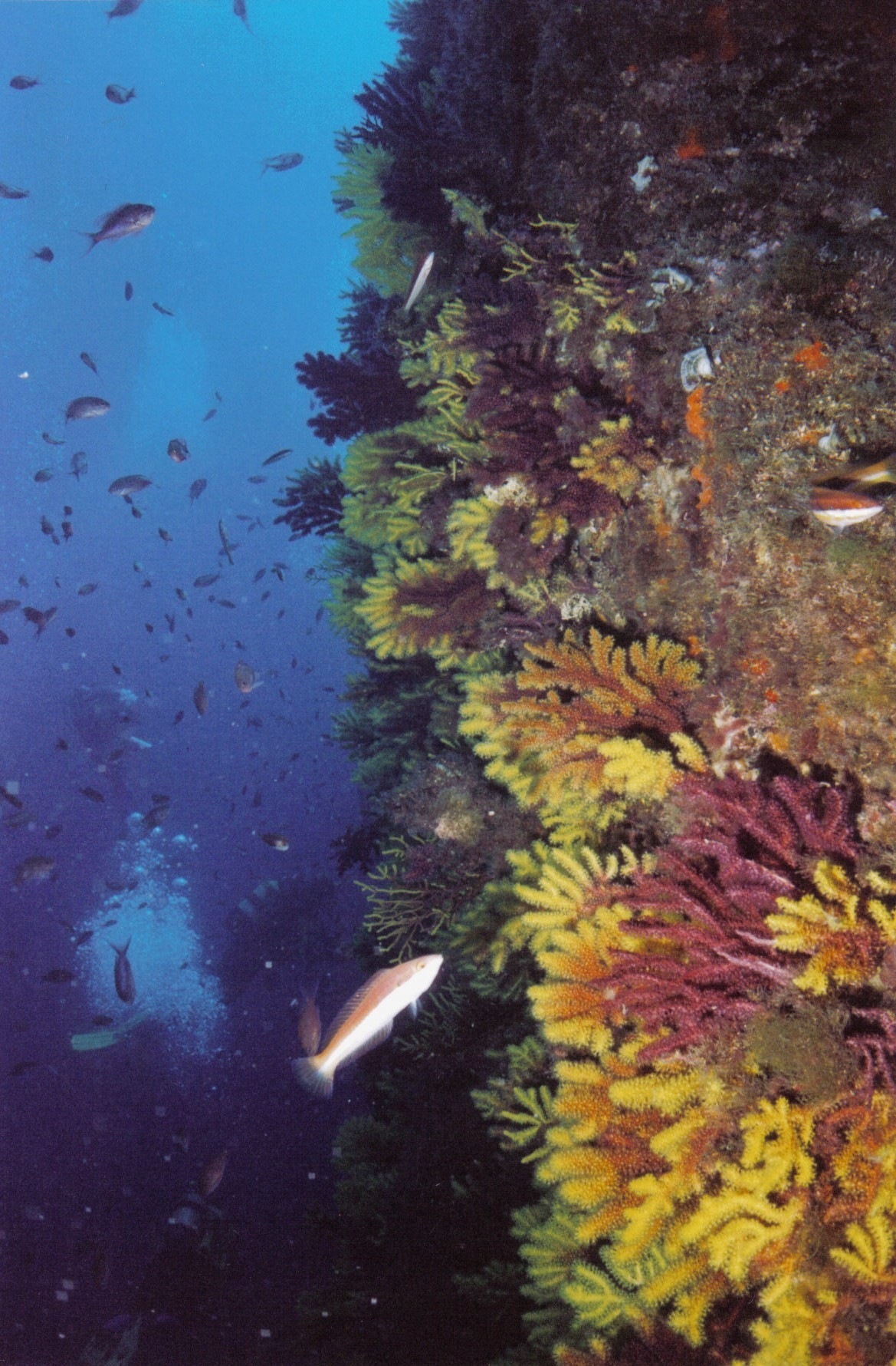 Gorgonienwand